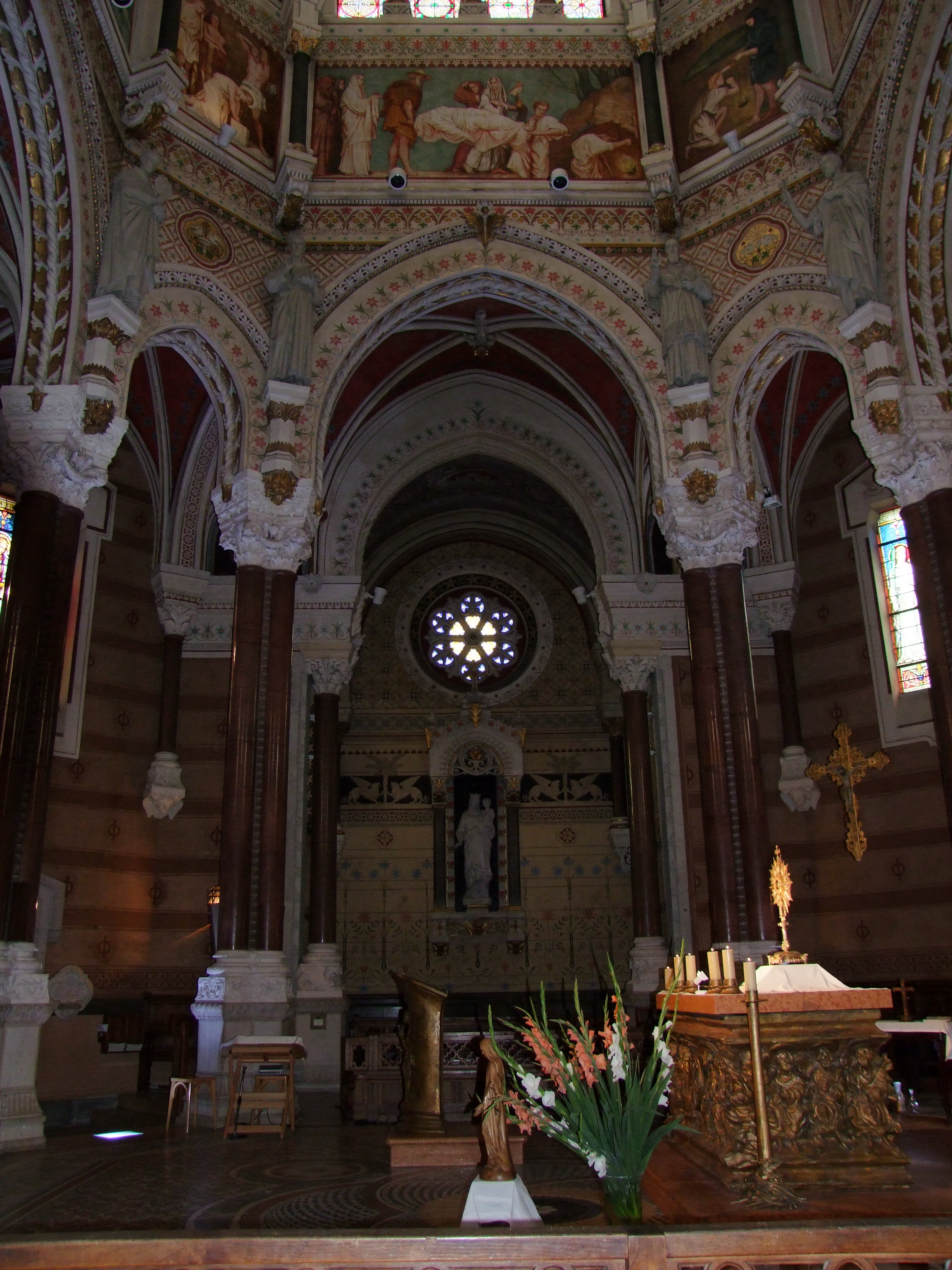 Ars-sur-Formans - wnętrze bazyliki